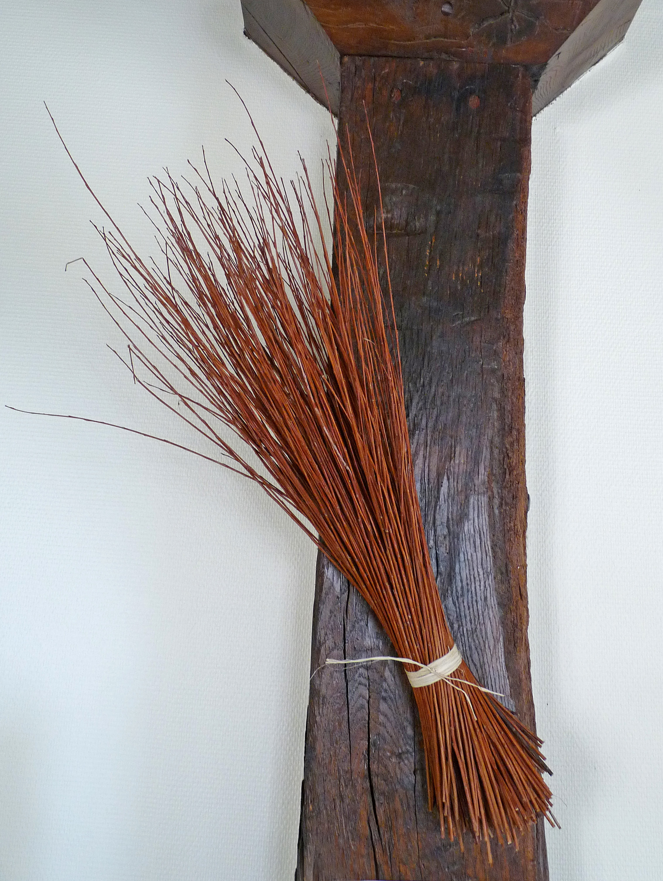 Botte d'osier brut à la Maison de la Vannerie (Fayl-Billot, Haute-Marne)